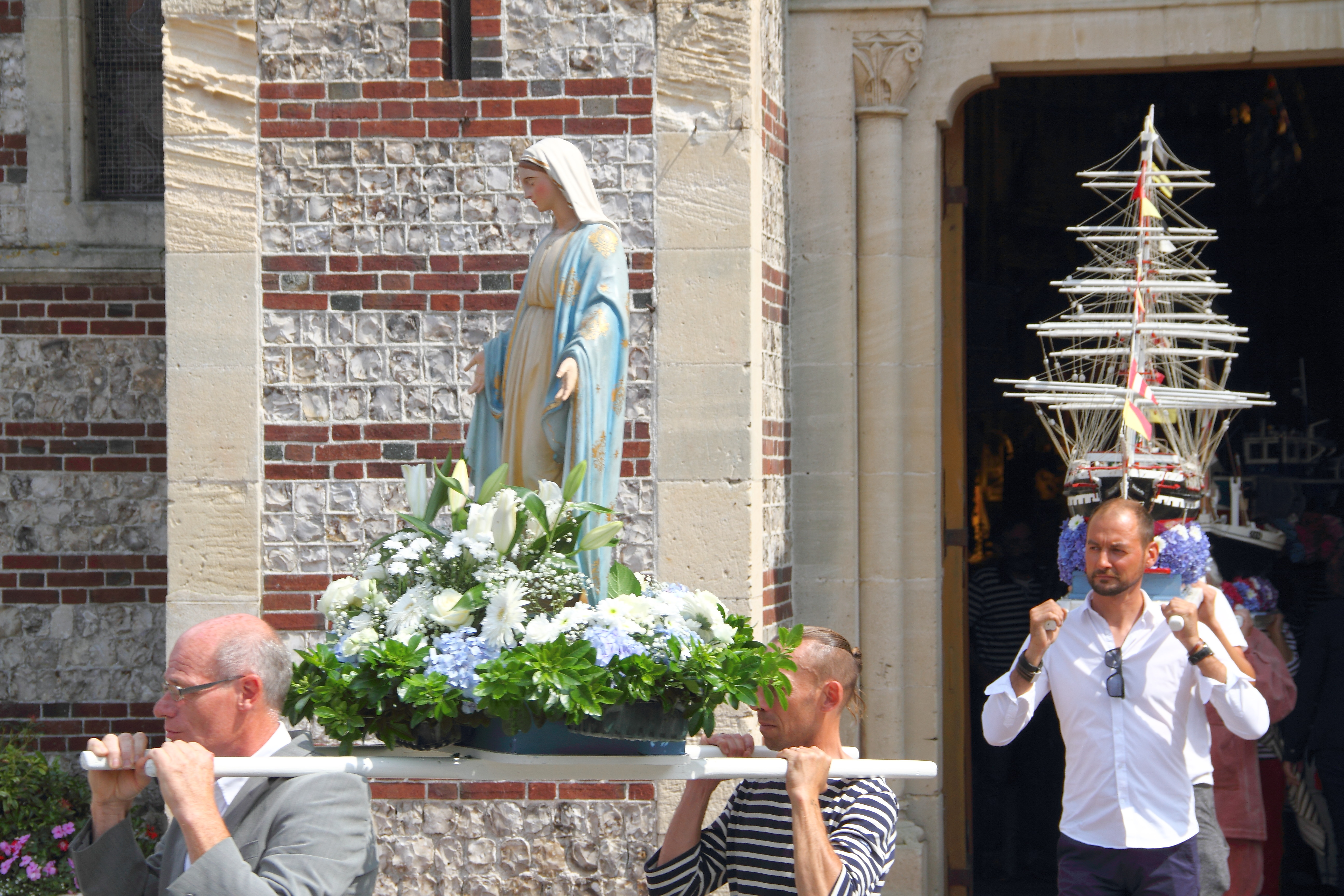 Jedes Jahr am 15. August werden in Yport in einer feierlichen Prozession Modelle von Schiffen von der Kirche Saint Martin an das Meeresufer getragen. Dort werden die Fischerboote in einer Zeremonie auf dem Wasser gesegnet. Begleitet wird die Feier von Ausstellungen mit Werken einheimischer Künstler, die im Anschluss an den Segen für wohltätige Zwecke versteigert werden.